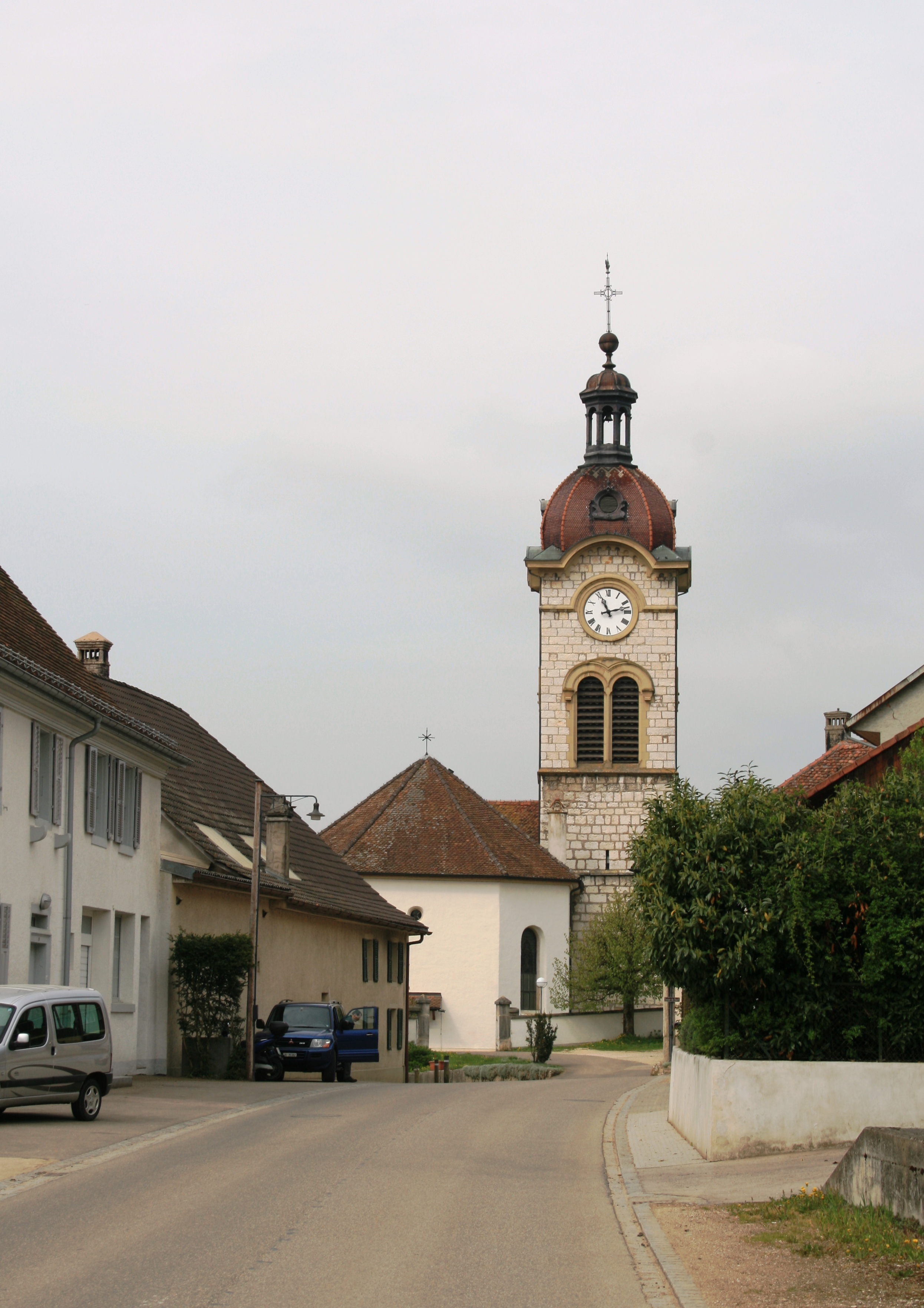 Kirche von Charmoille JU, Schweiz